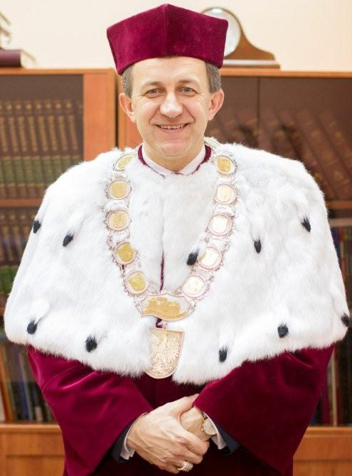 prof. zw. dr hab. Witold Stankowski, historyk i politolog.